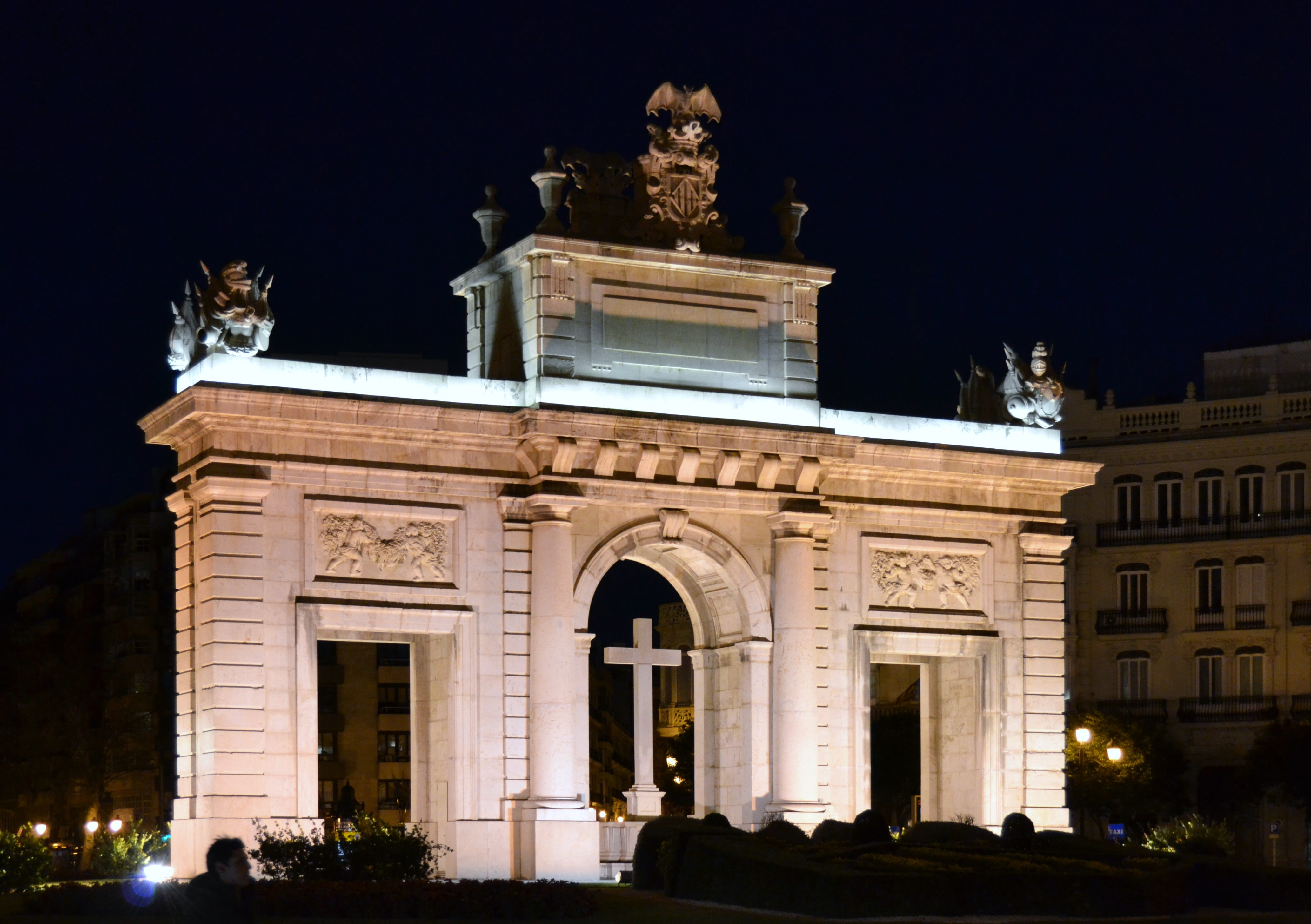 València, porta del Real o de la Mar de nit.